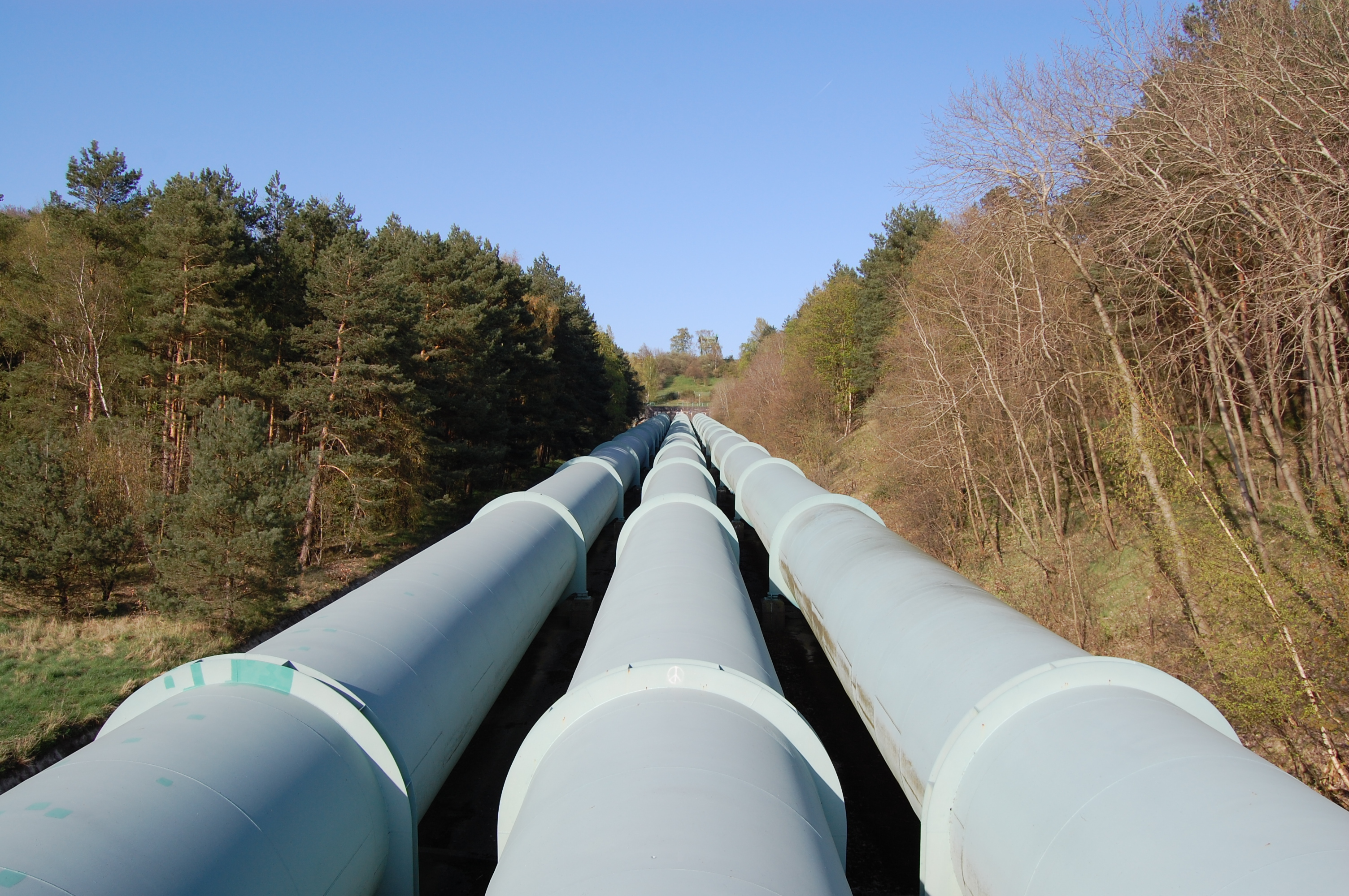 Die Rohre des Pumpspeicherkraftwerks Geesthacht